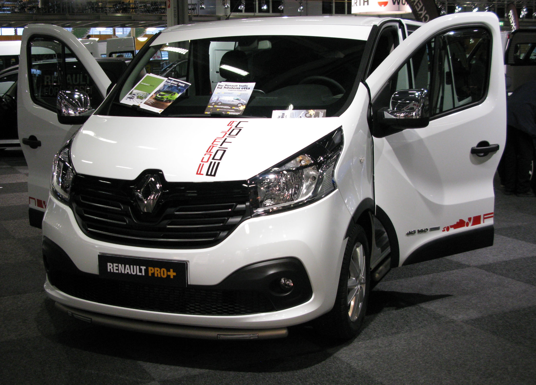 Renault Trafic III